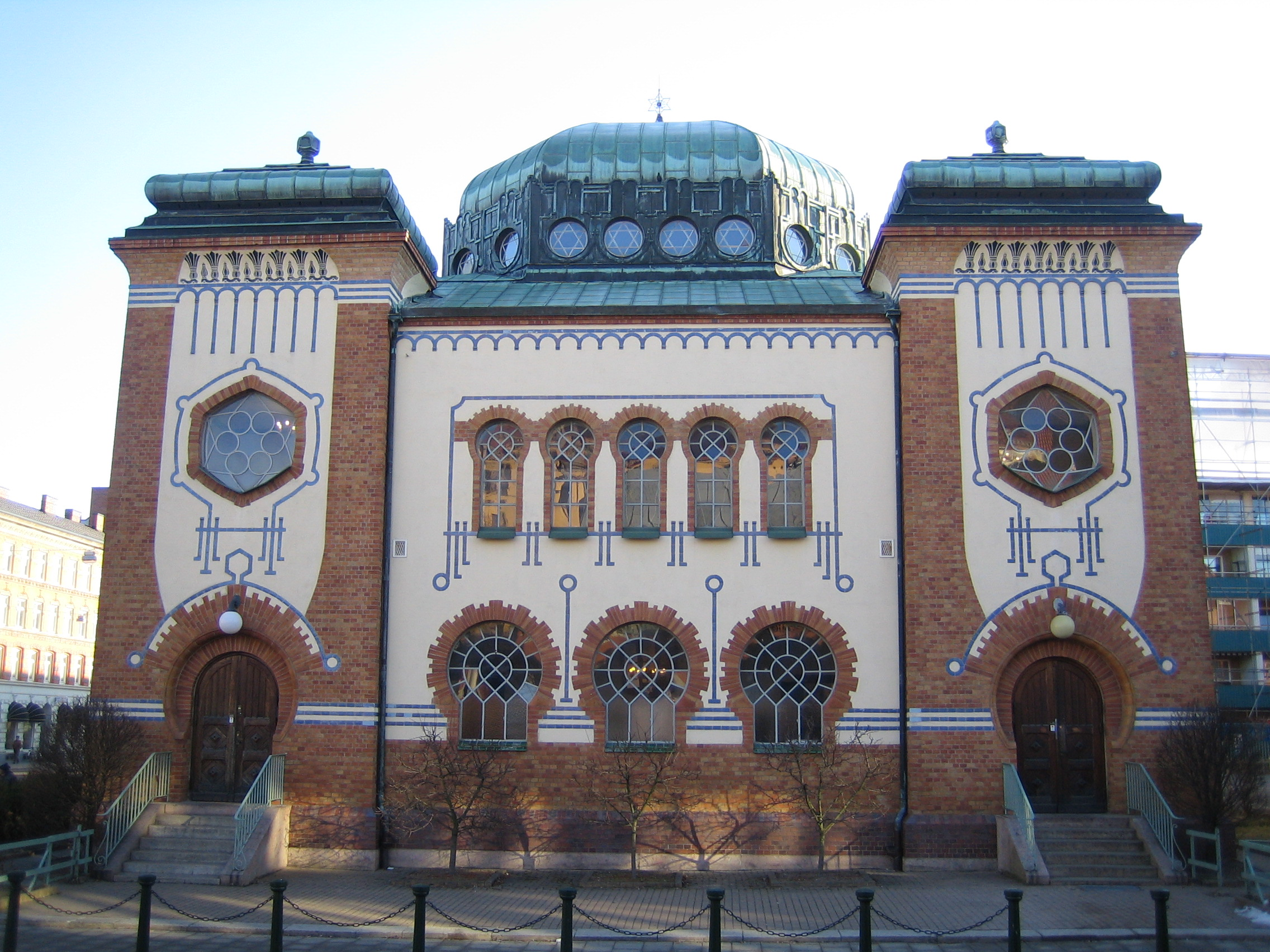 Malmö synagogue.